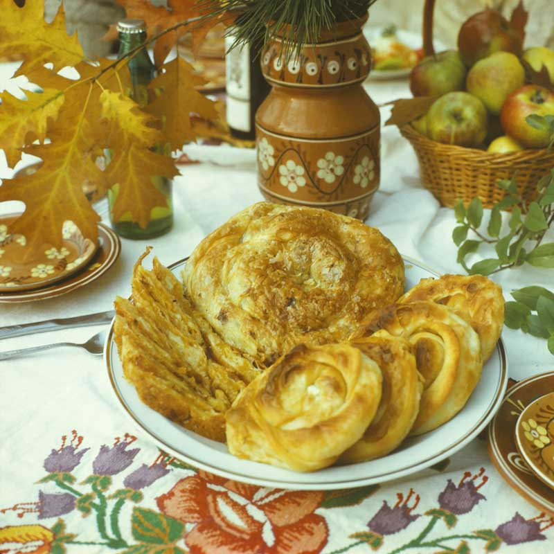 Bon appetit!